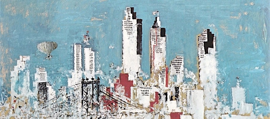 Wilhelm Thöny (ohne Titel, New York) nach 1933